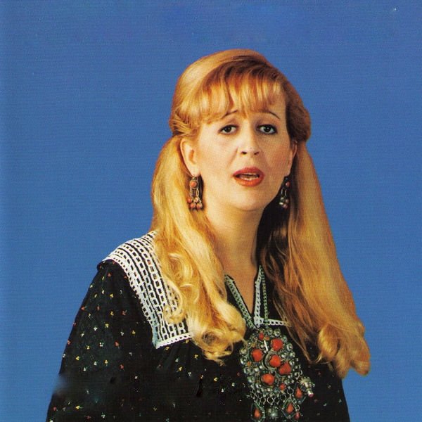 Malika Domrane, chanteuse algérienne d'expression kabyle.